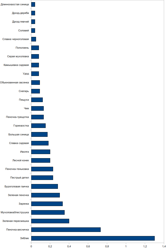 Диаграмма, показывающее численность некоторых птиц на участке берёзового сосняка. Данные взяты из работы И. А. Аверина, Н. А. Хохлова. Численность лесных птиц в Керженском заповеднике в гнездовой период//Труды Государственного природного заповедника «Керженский». -Том 2. - с. 53-54